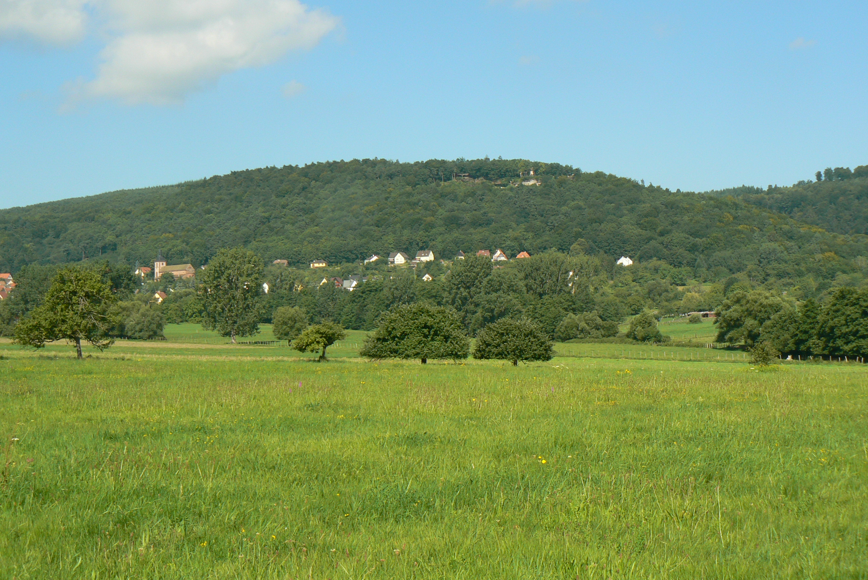 Vue générale du Mt St Michel et de St Jean Saverne (Bas Rhin - 67)